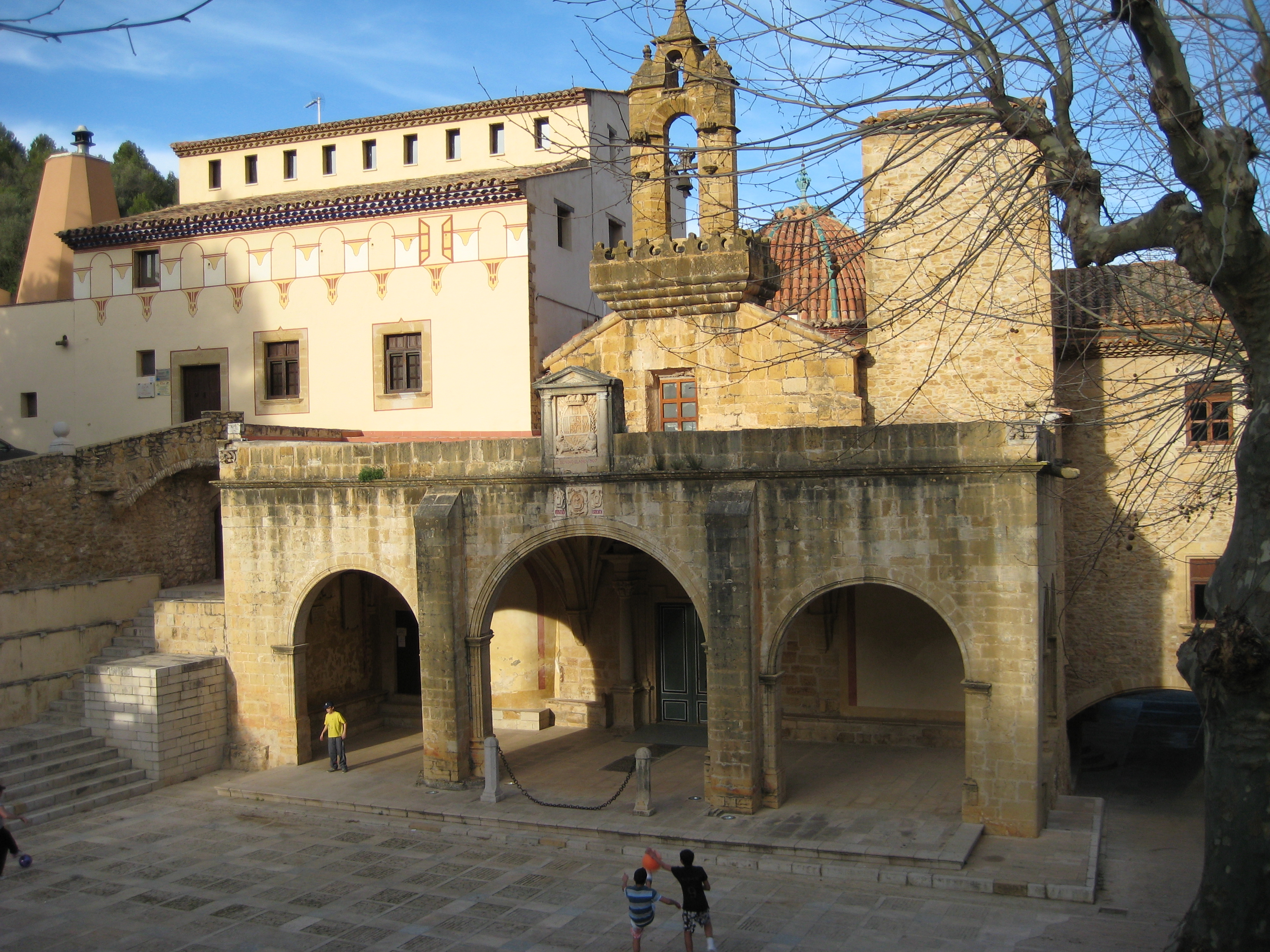 Vista frontal del Reial Santuari de la Mare de Déu de la Font de la Salut de Traiguera (Baix Maestrat)